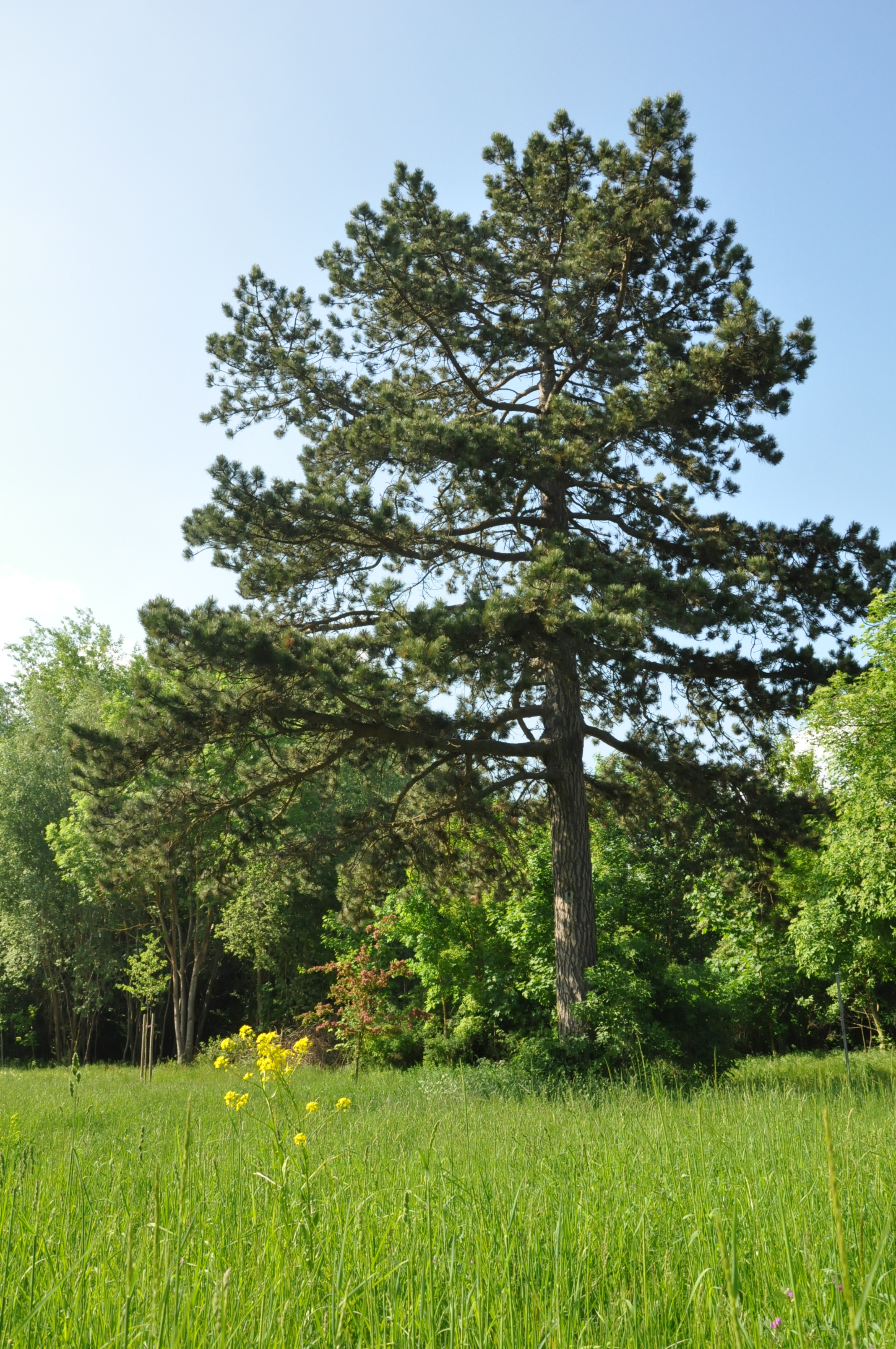 Naturdenkmal Nr. 31 Schwarz-Kiefer, Rüdersdorf bei Berlin, Landkreis Märkisch-Oderland, Brandenburg, Auf dem Platz am Kesselsee, Solitärbaum mit ausladender Krone